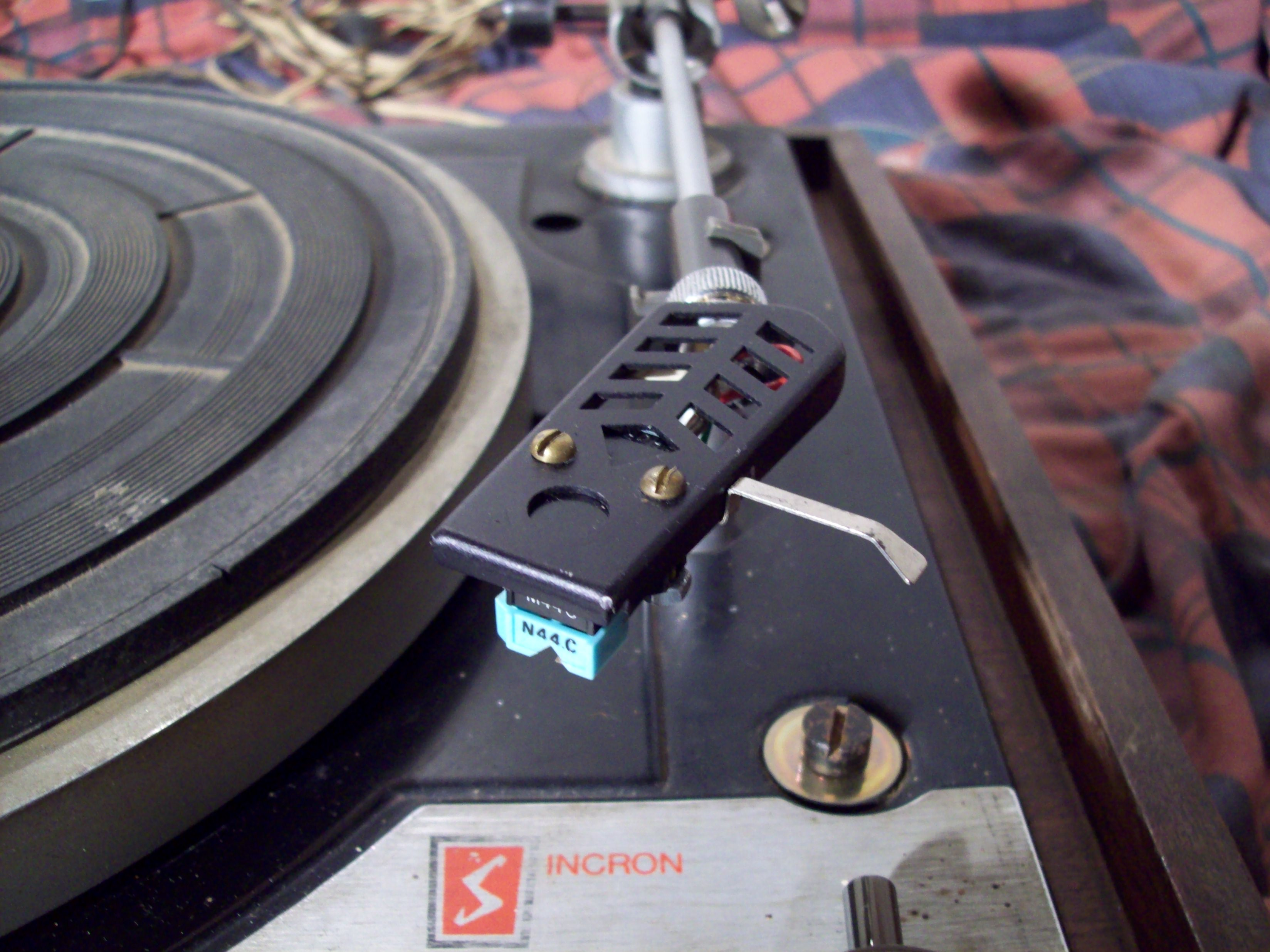 Es el portacapsula, capsula y púa de un tocadiscos Sincron, Argentina.